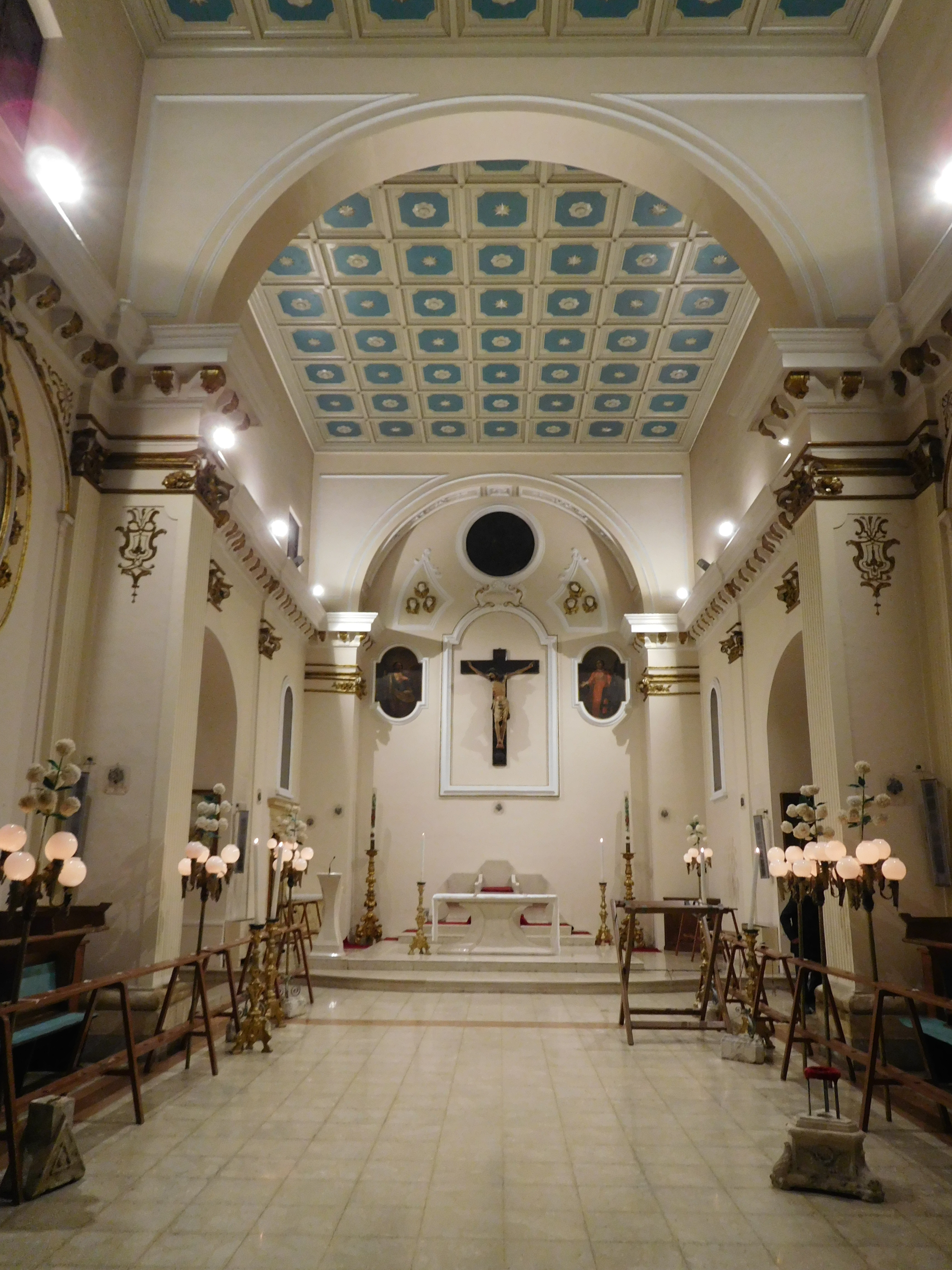 Chiesa della Santissima Trinità, Sulmona